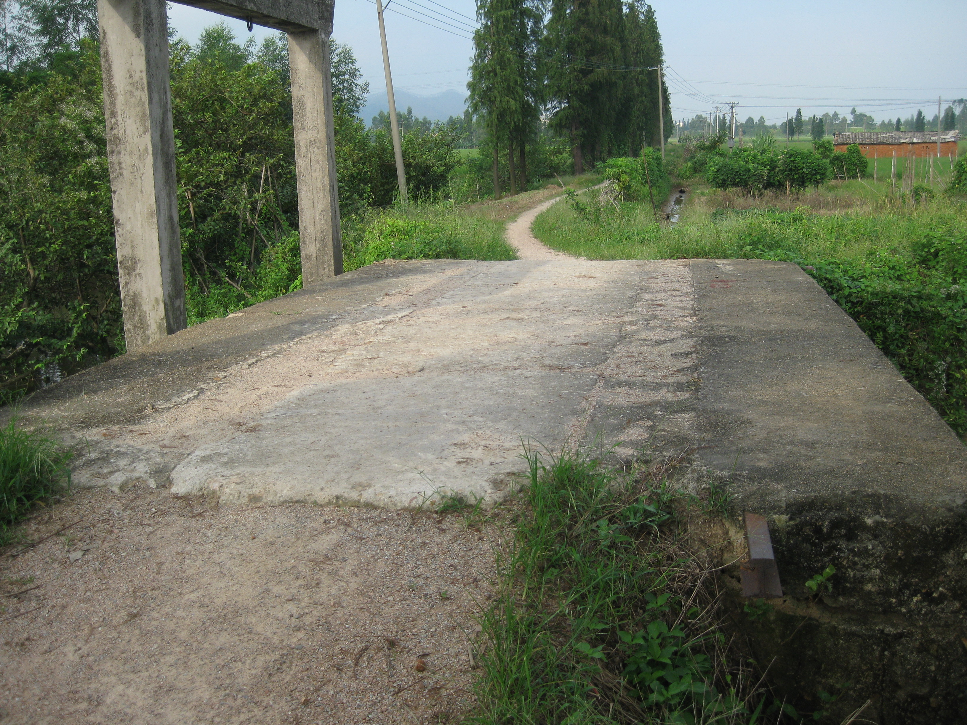 铁路桥上的路轨